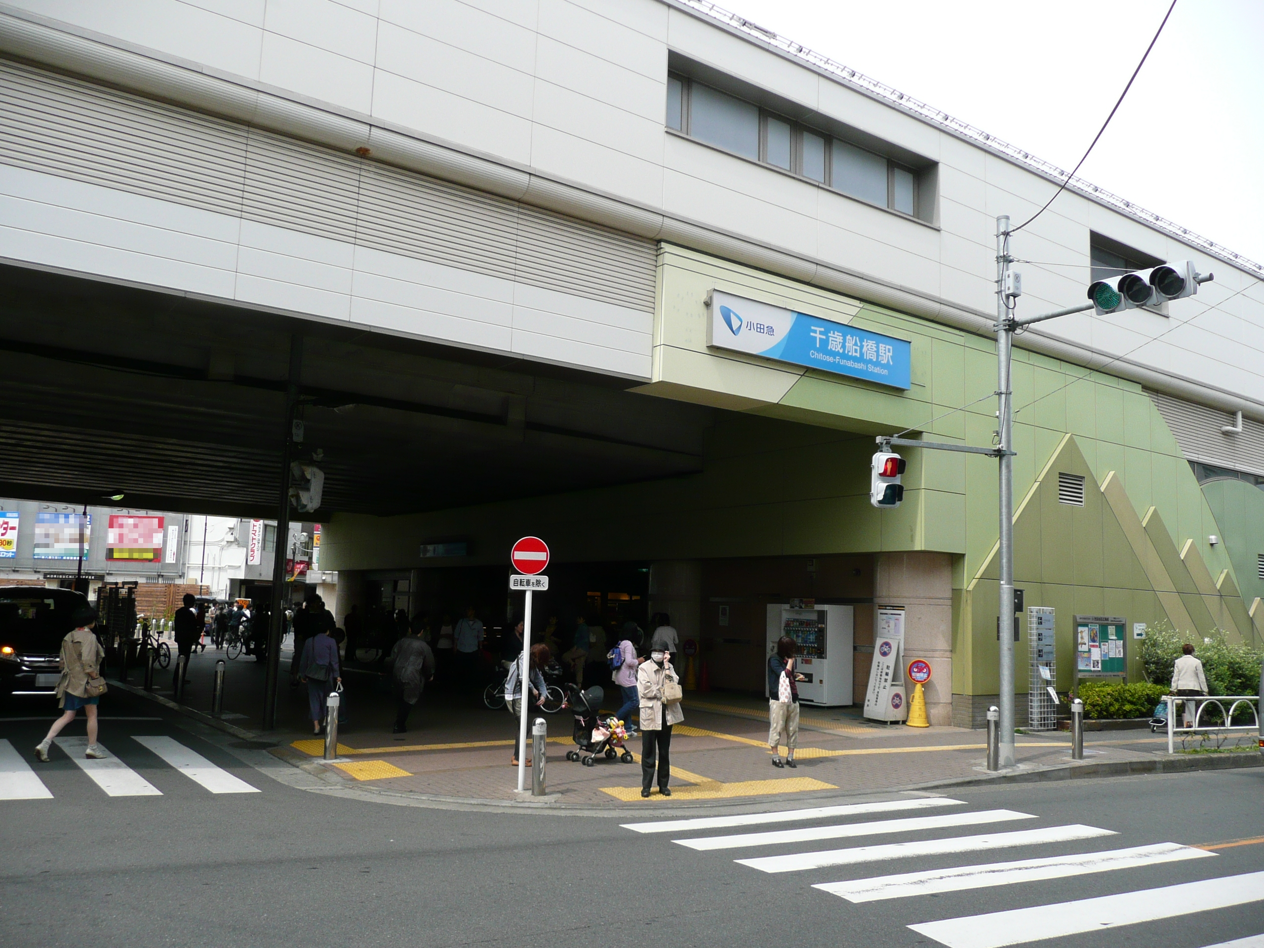 千歳船橋駅南口